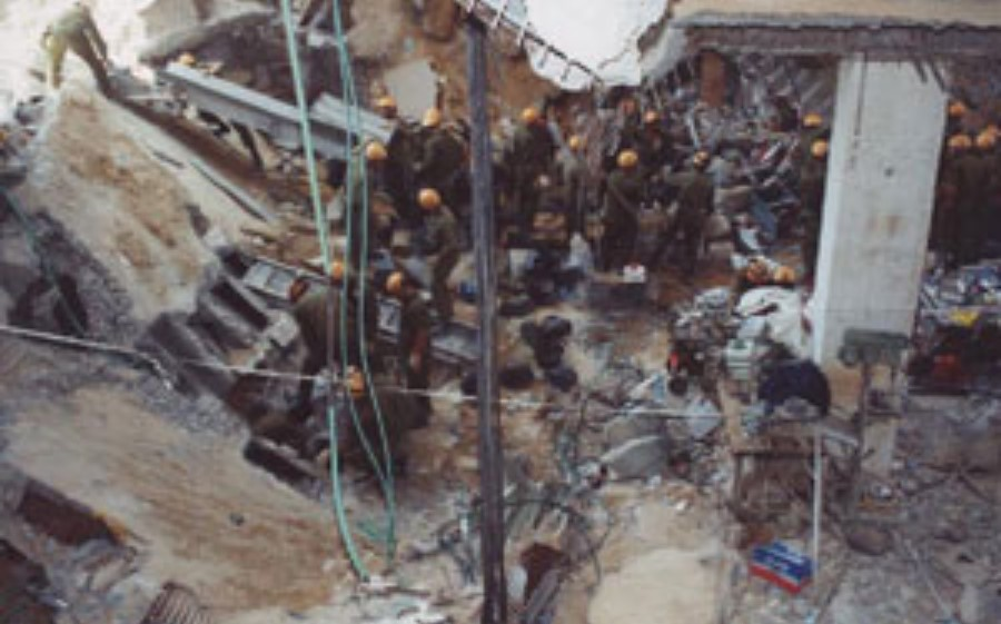 תמונות ממקום האסון באולמות "ורסאי" בירושלים